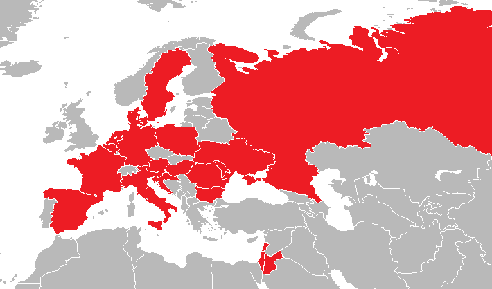 Thaumetopoea processionea distribution, countries only